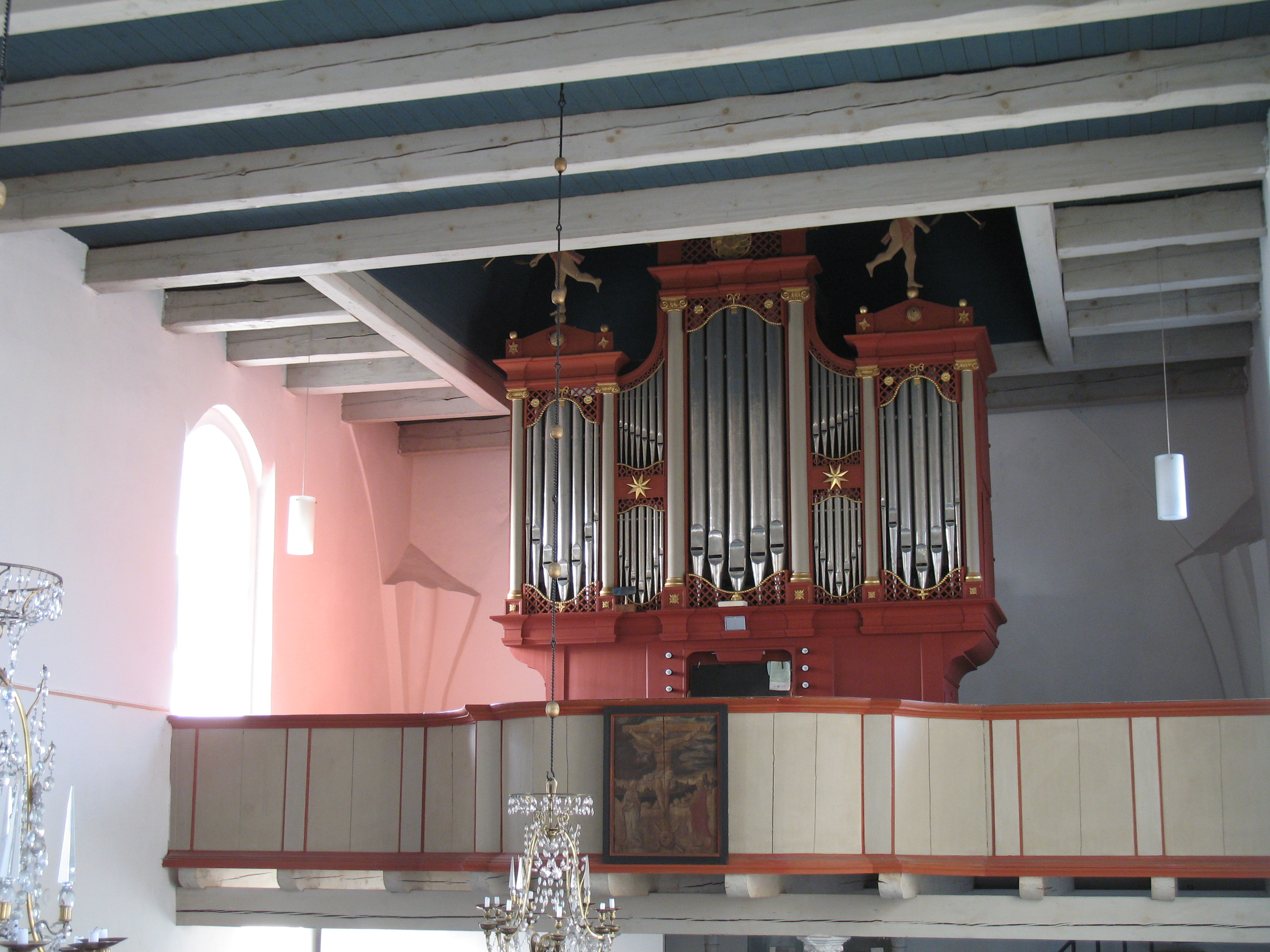 Orgel der Kirche in Wiesens, Ostfriesland